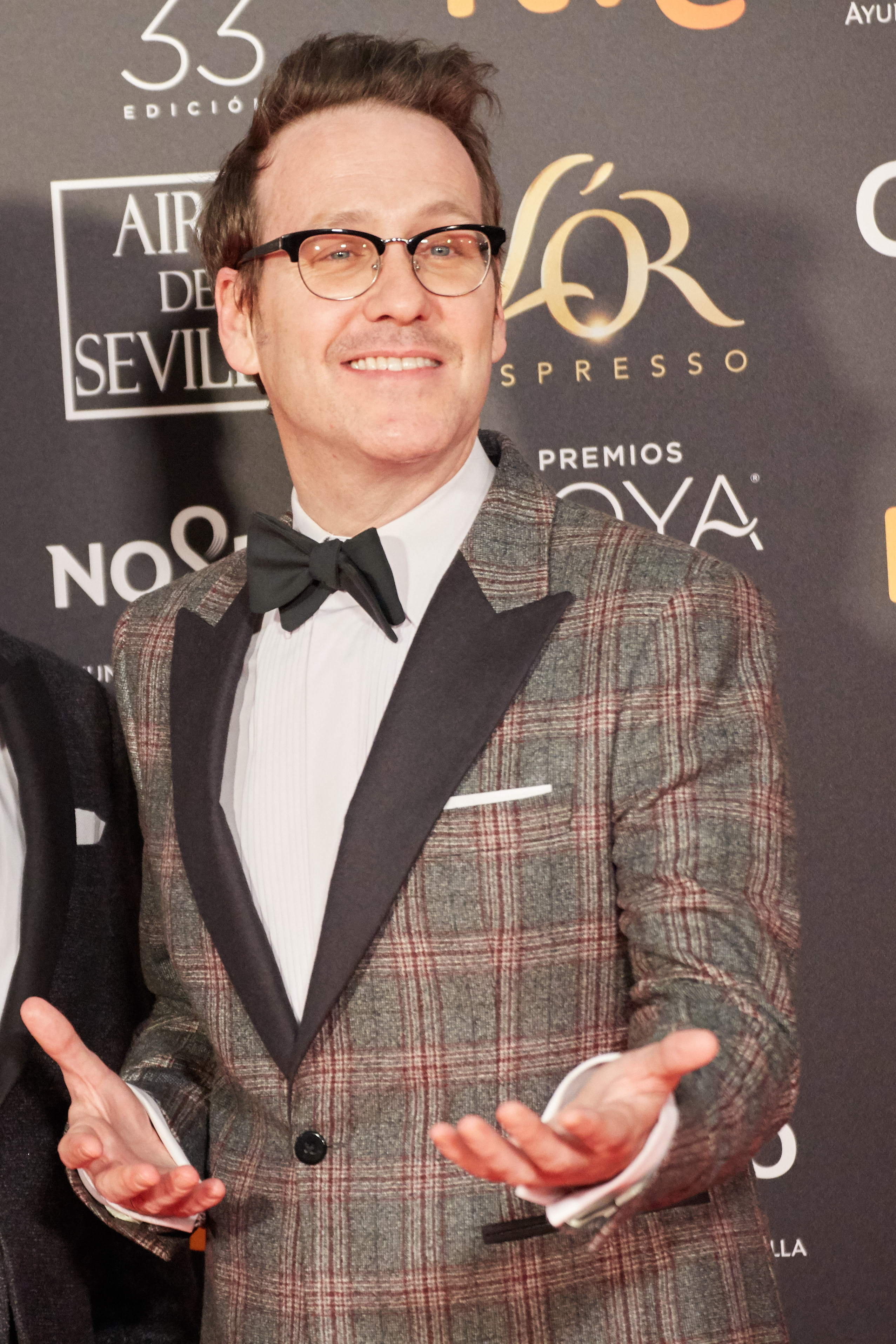 Joaquin Reyes en la alfombra roja de los Premios Goya celebrados en Sevilla en Febrero 2019